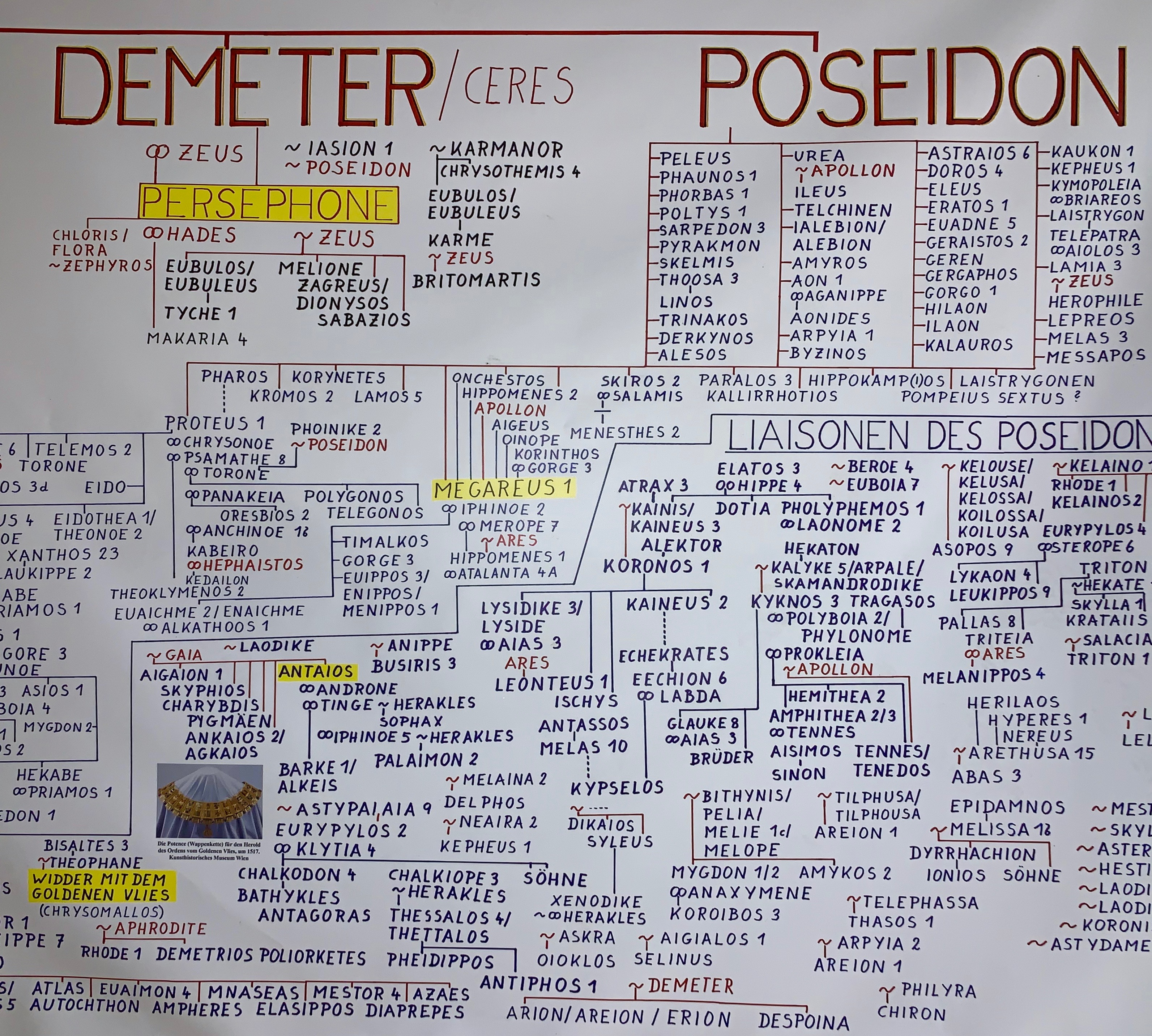 Gesamtgenealogie der griechischen Mythologie von Dieter Macek Ausschnitt (ca. 5% der Gesamtgenealogie)